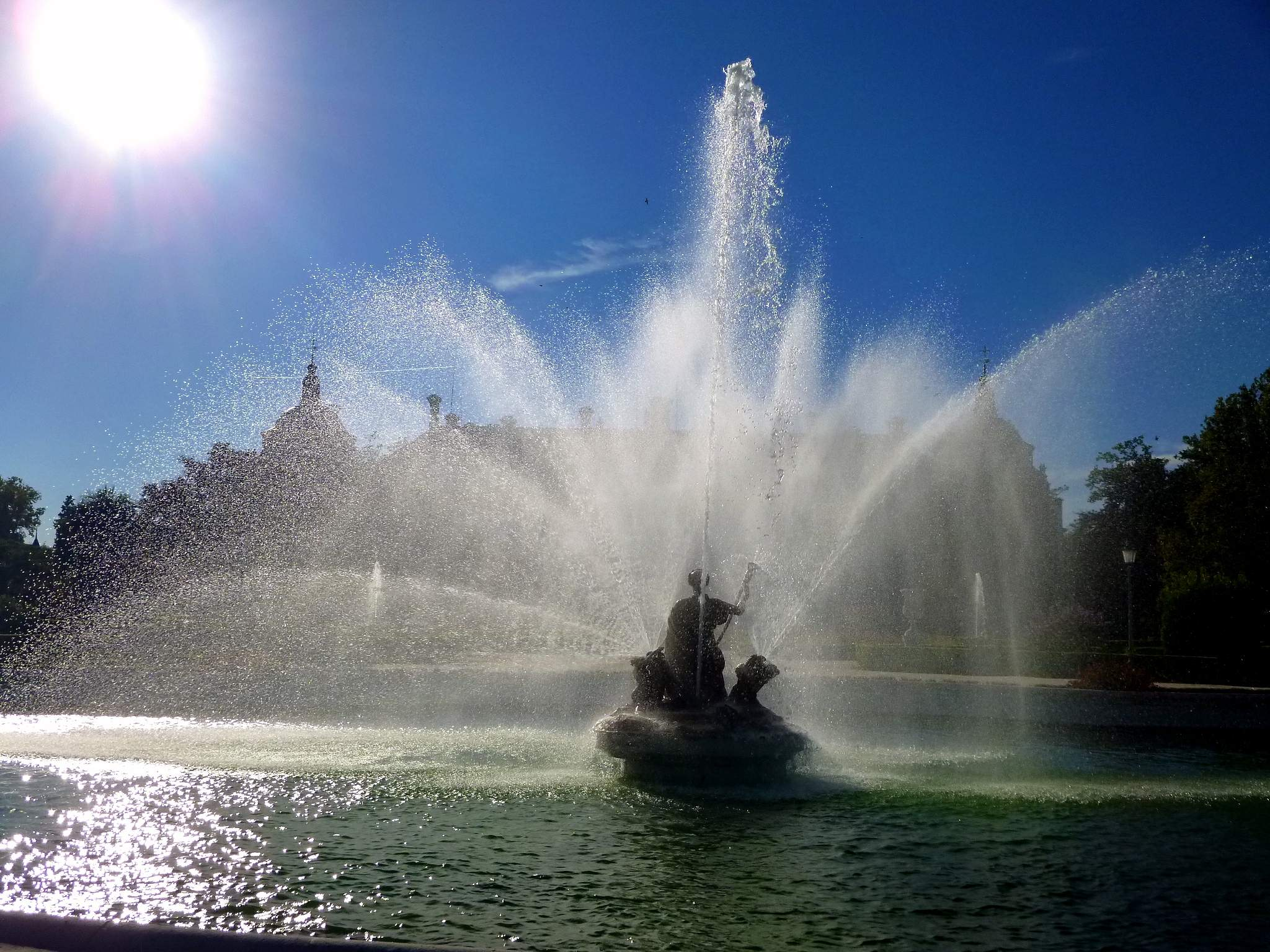 Fuente de Ceres, Jardín del Parterre, Real Sitio de Aranjuez